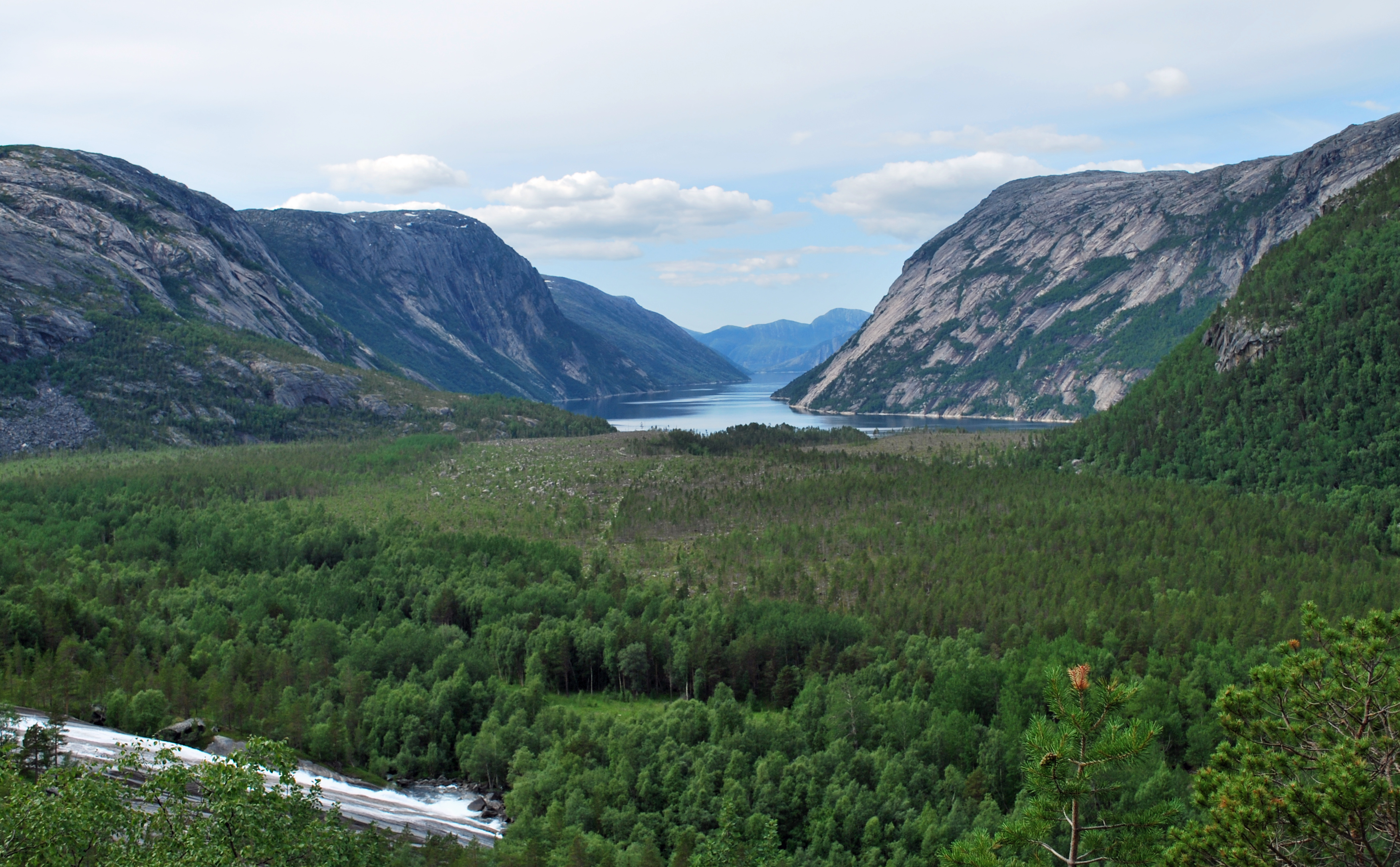 Hellemobotn og platået innenfor, med Hellemofjorden i bakgrunnen